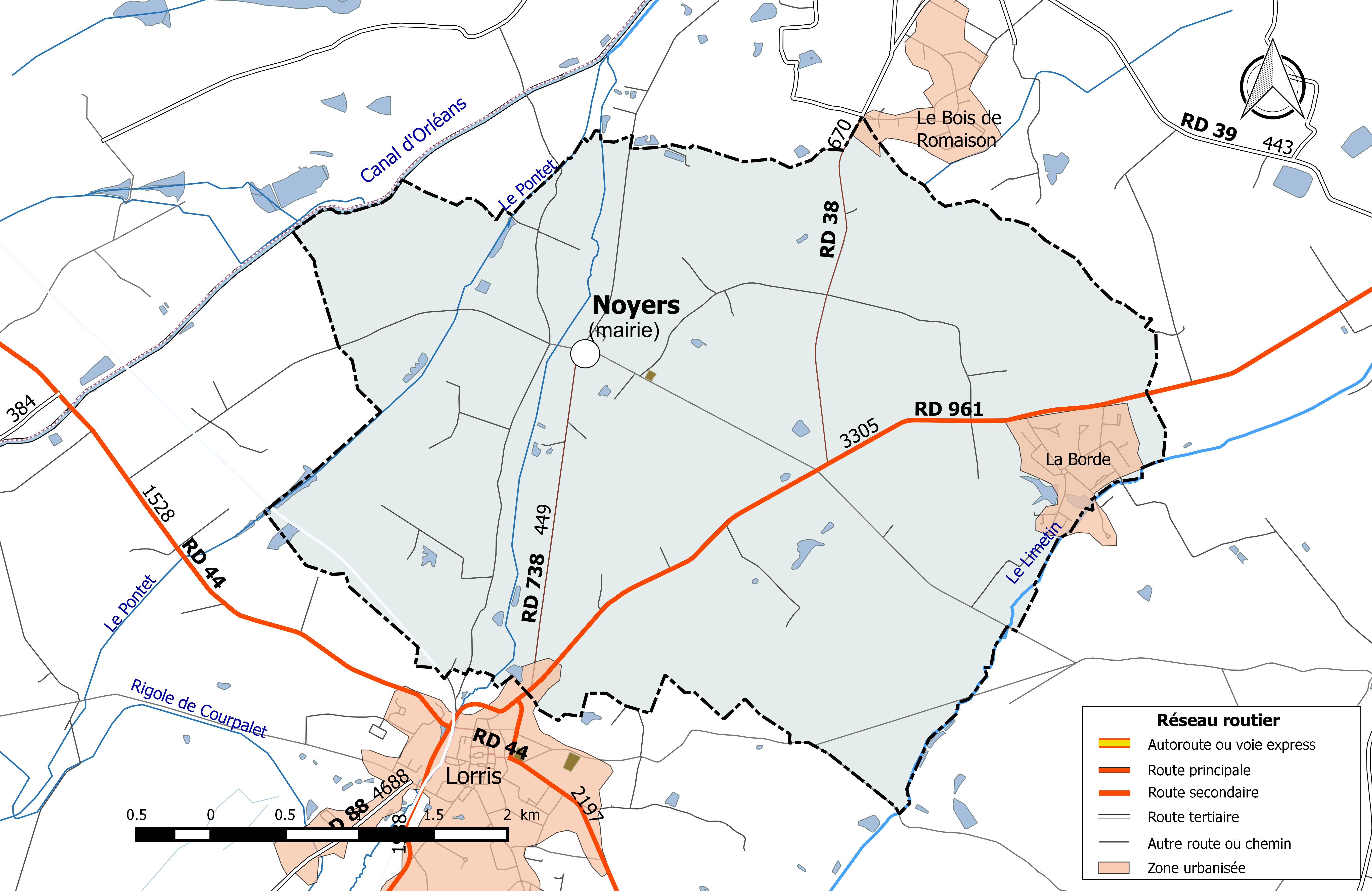 Carte du réseau routier de la commune de Noyers (Loiret).